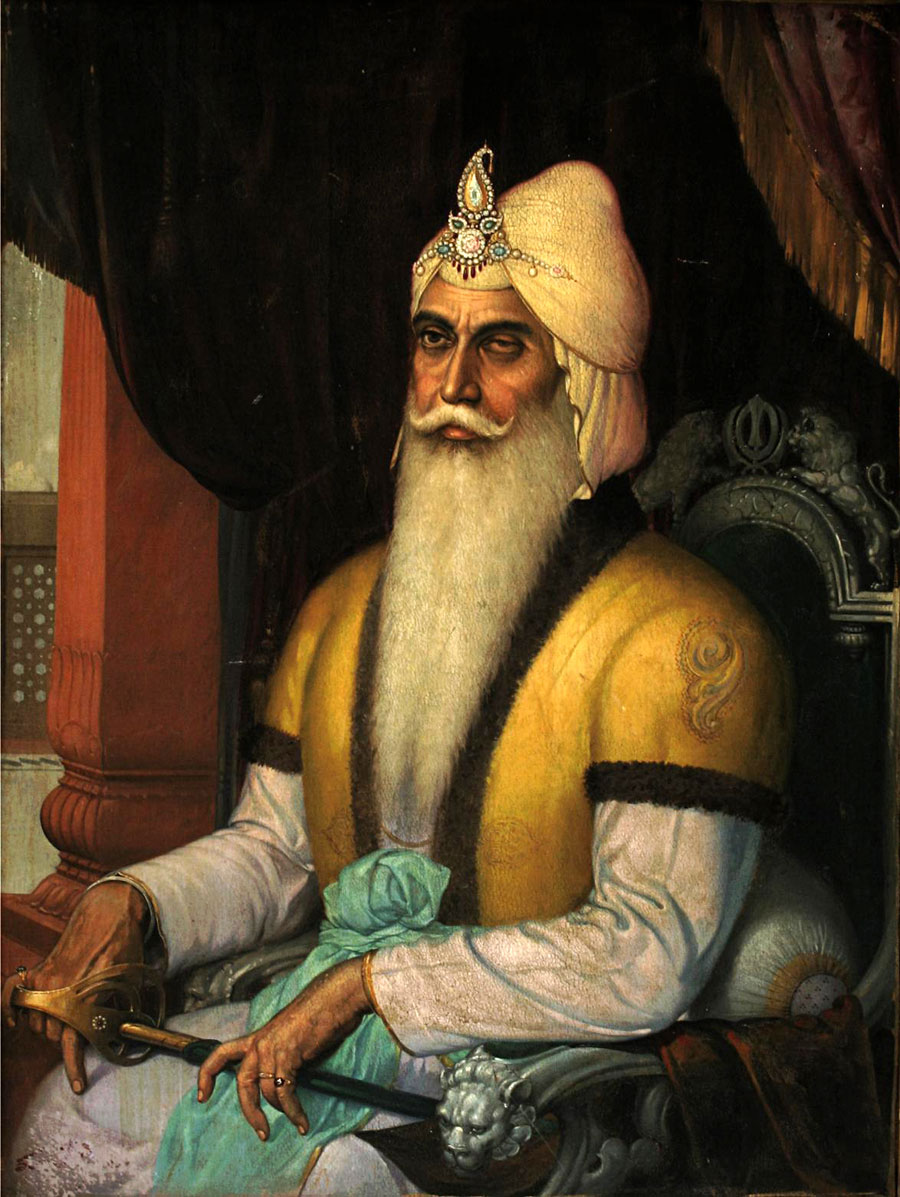 Maharaja Ranjit Singh